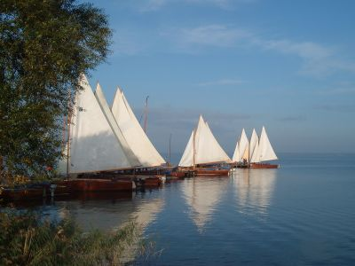 Auswanderer unter Segeln am Anleger Ratskeller / Steinhude selbst fotografiert